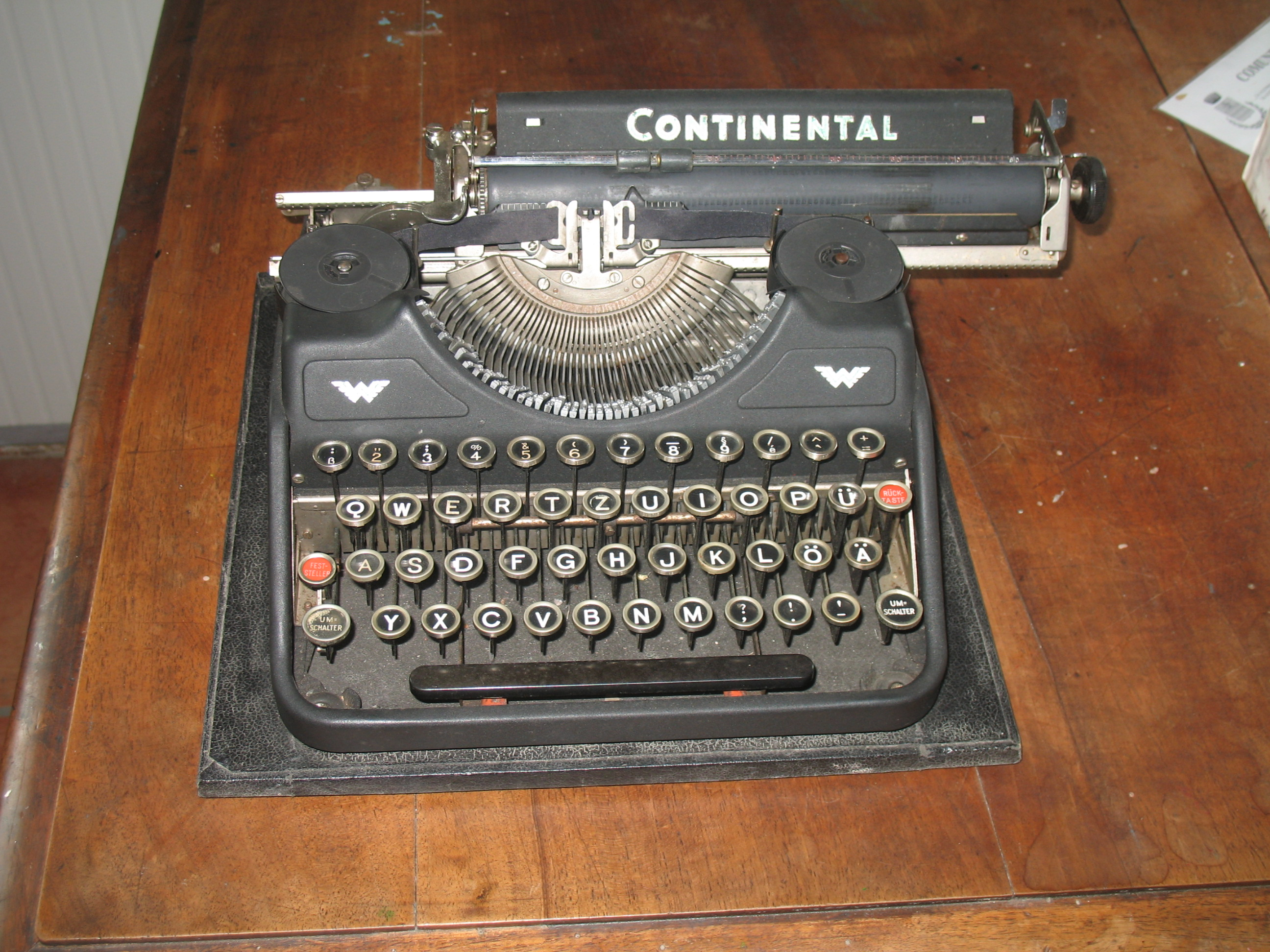 Andrate, provincia di Torino (Piemonte, Italia) - Museo di cultura contadina